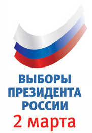 Логотип президентских выборов в России (2008)